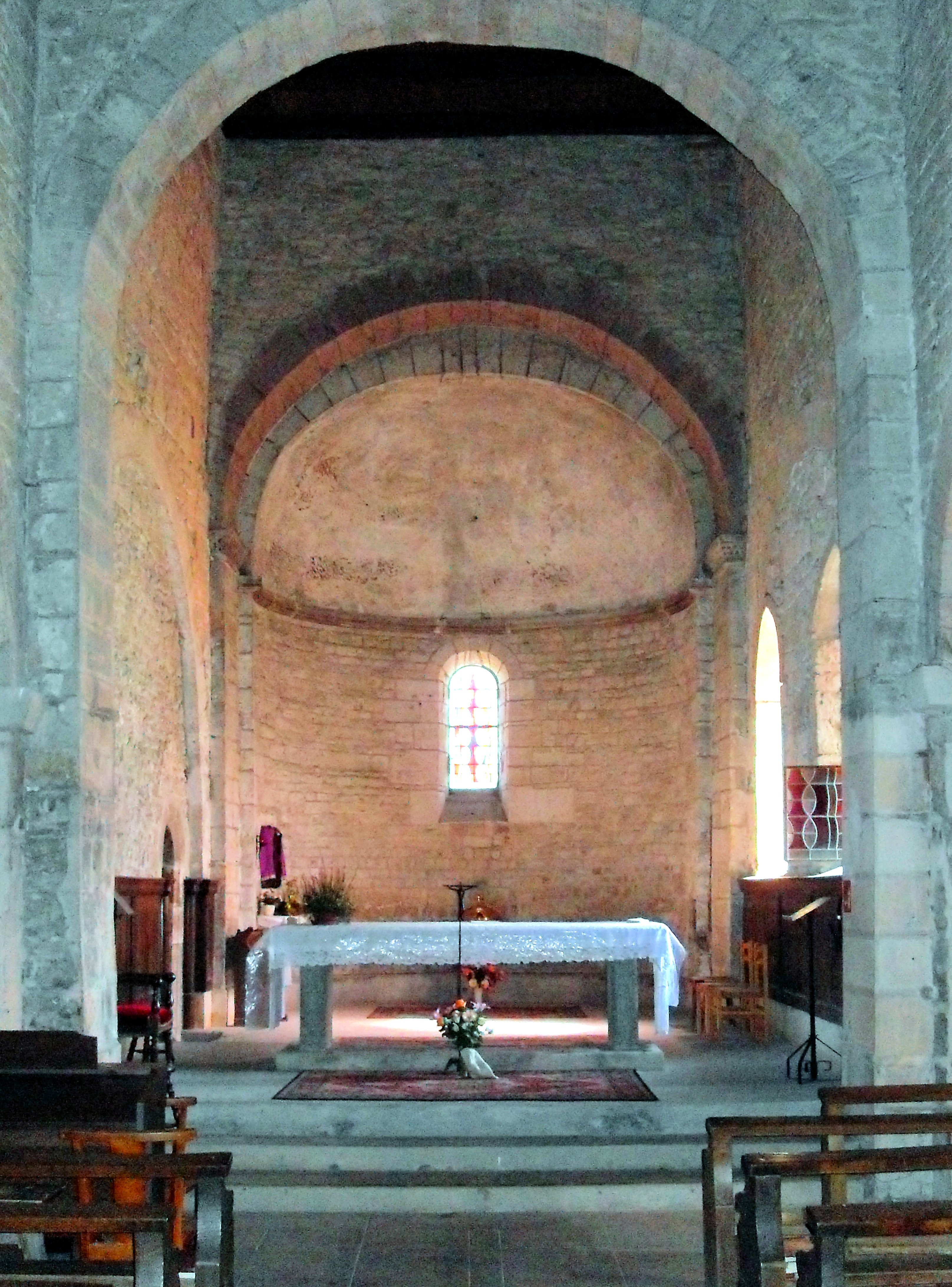 L'église Saint-Pierre à Froidefontaine